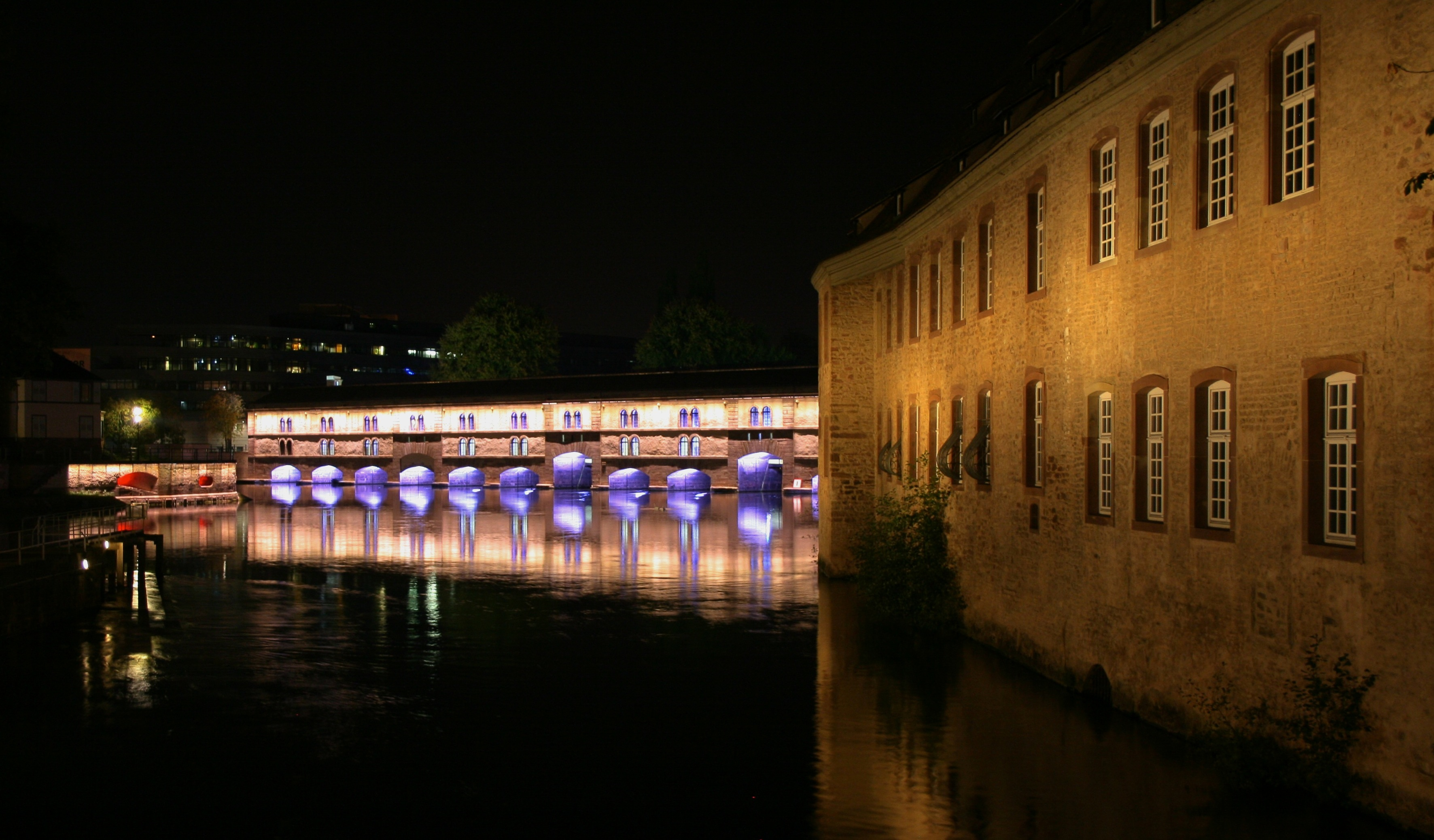 Strasbourg nouvelle mise en lumière barrage Vauban 2012. Sur la droite, la Commanderie Saint Jean